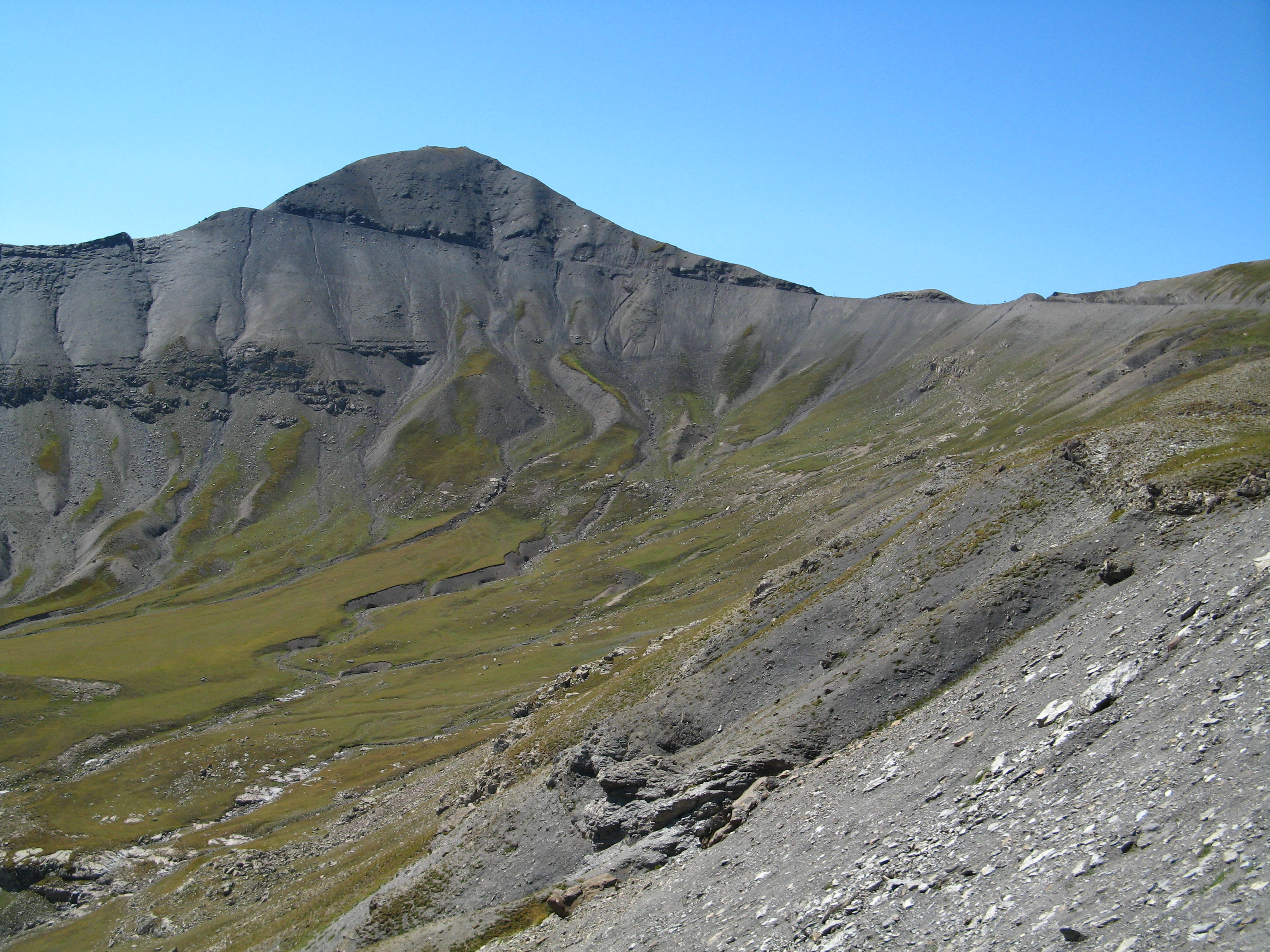 La Cime de la Bonette et son final très difficile, vue depuis les Alpes-Maritimes, sur le versant sud